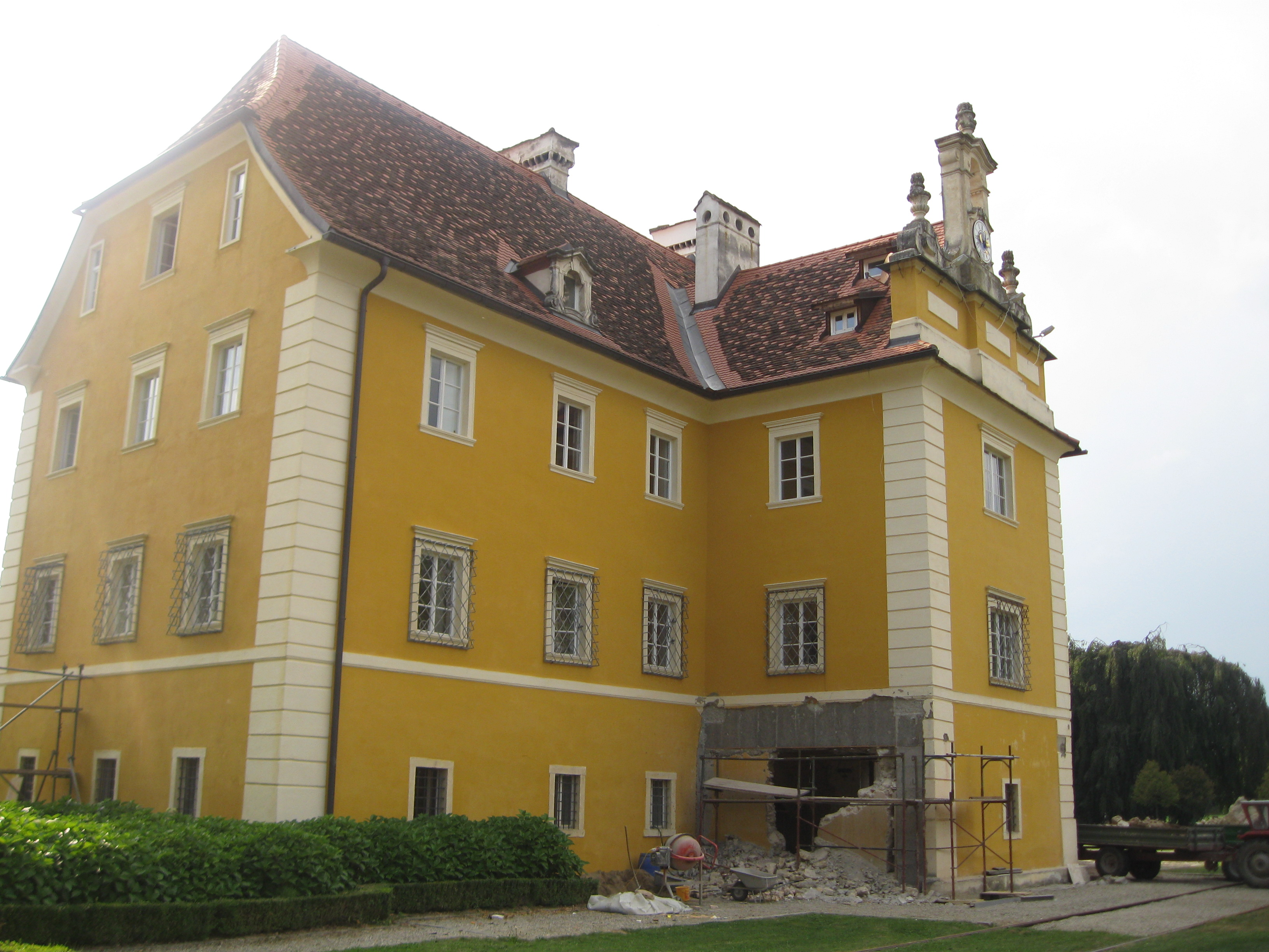 Grad Eybesfeld v vasi Jöß občina Lang na avstrijskem Štajerskem.